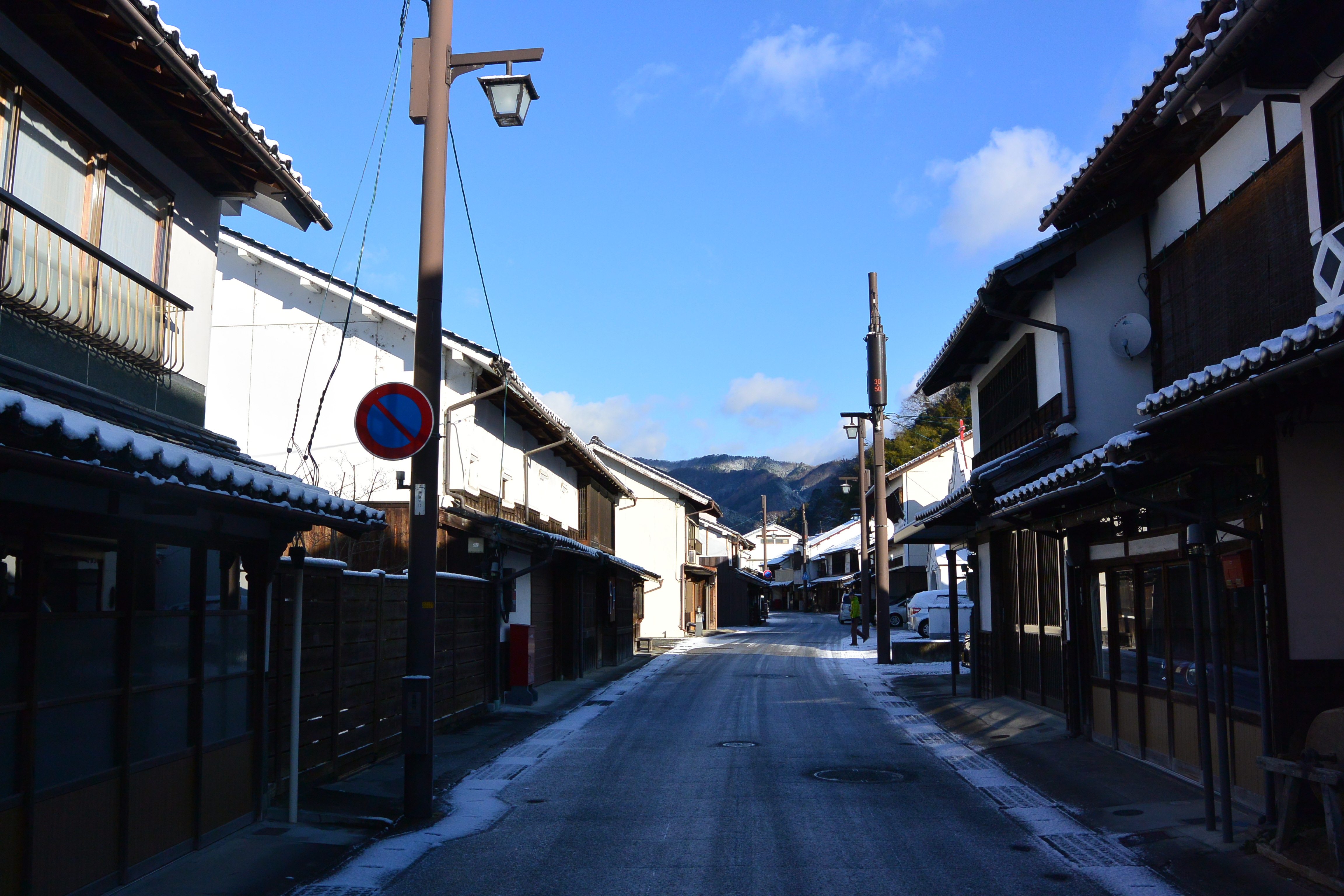 岡山県真庭市「勝山町並み保存地区」冬の早朝 Nikon 1 AW1 + 1 Nikkor AW 11-27.5mm f/3.5-5.6